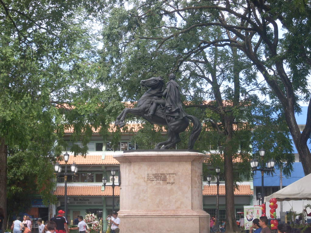 Plaza Bolívar de Guanare, en el estado Portuguesa - Venezuela (2010)